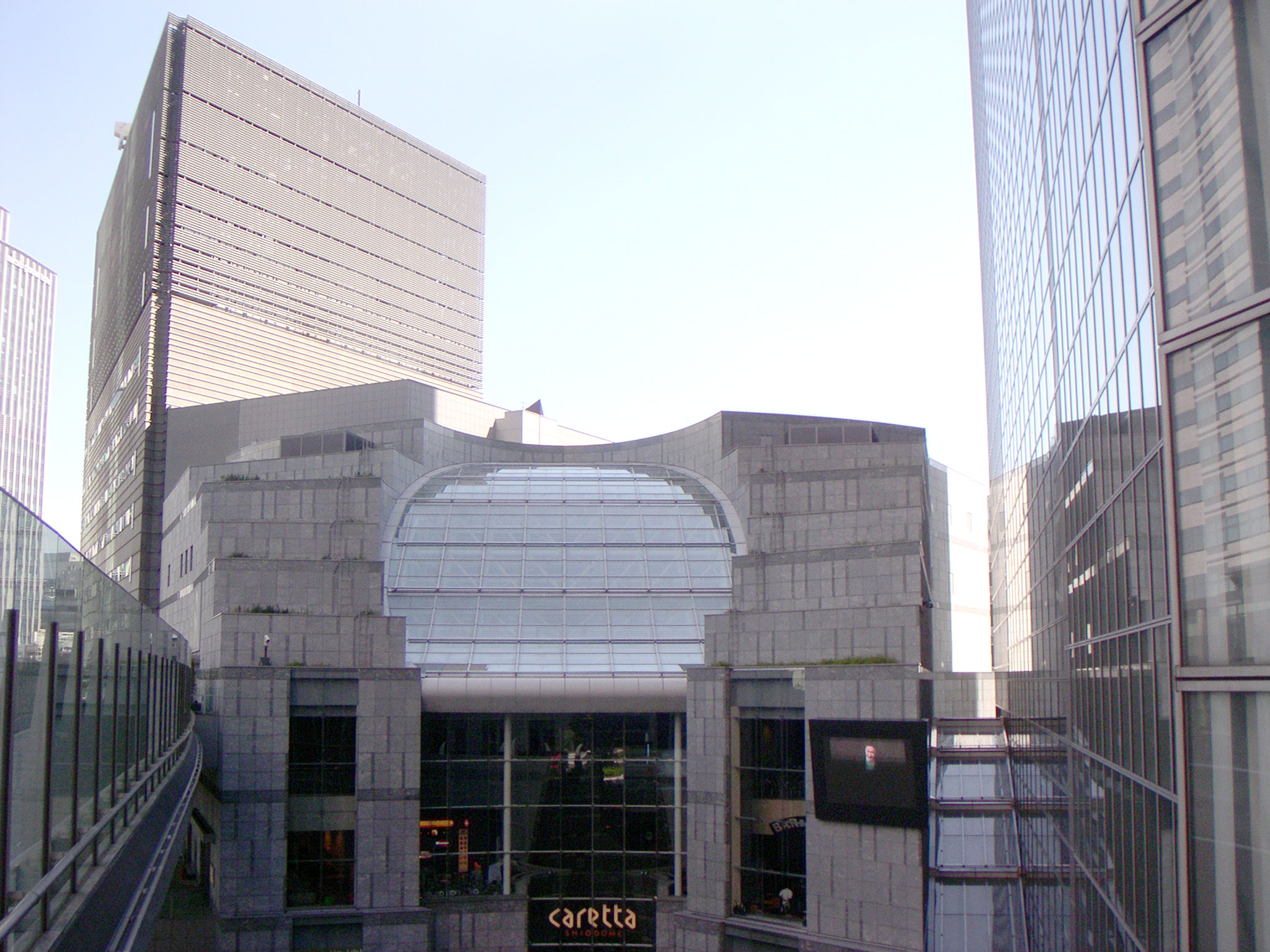 Caretta Shiodome and Shiodome Annex ja: 劇団四季「海」のあるカレッタ汐留と汐留アネックス（奥）